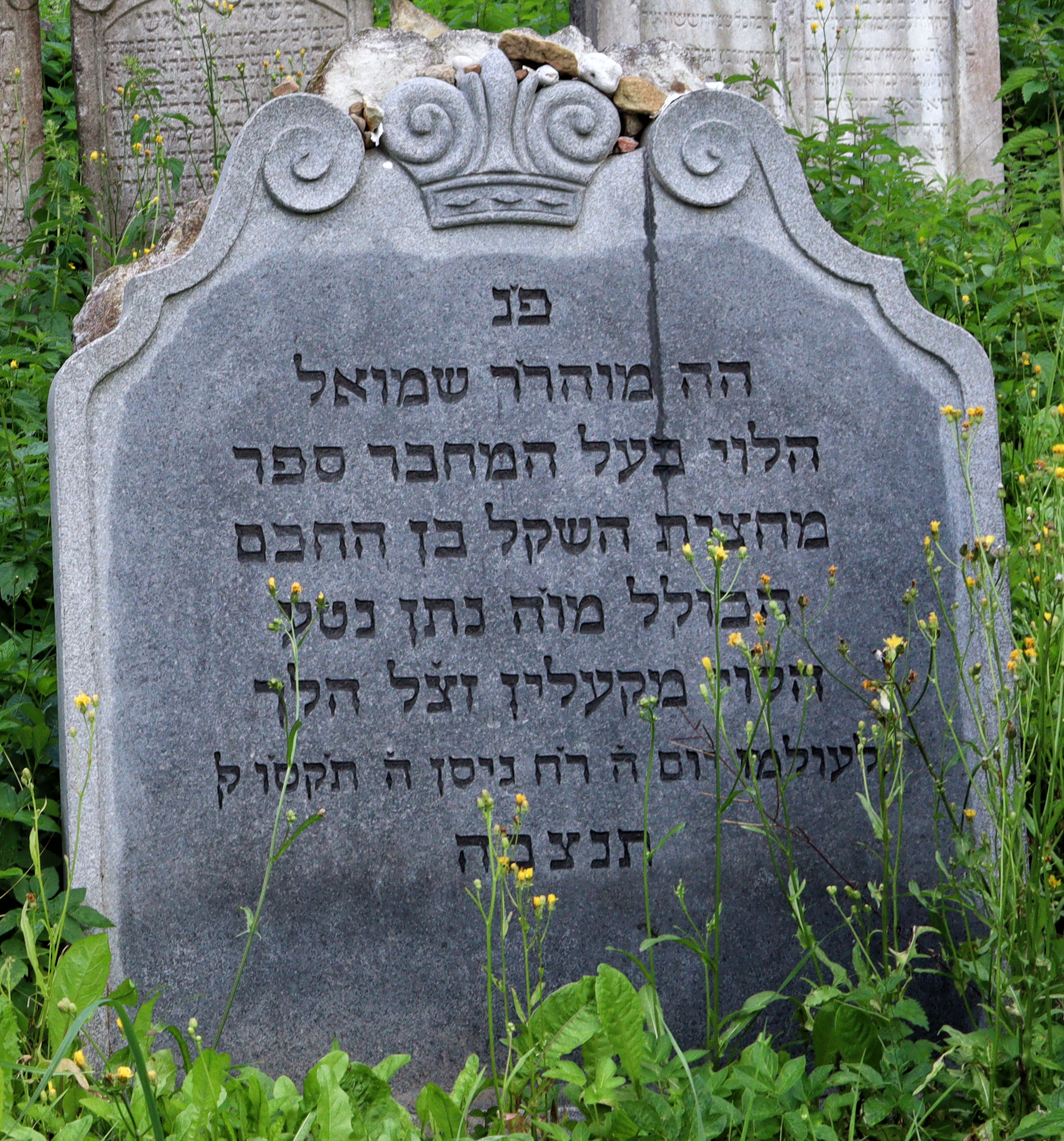 Nová maceva obsahující stručné údaje o Rebem.